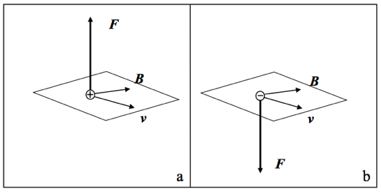 a) Karga positiboaren gaineko indar magnetikoa. b) Karga negatiboaren gaineko indar magnetikoa.